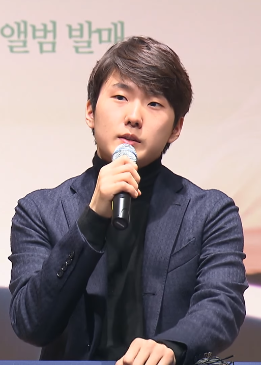 피아니스트 조성진 첫 정규 앨범 '쇼팽: 피아노 협주곡 1번 발라드' 발매 기자회견